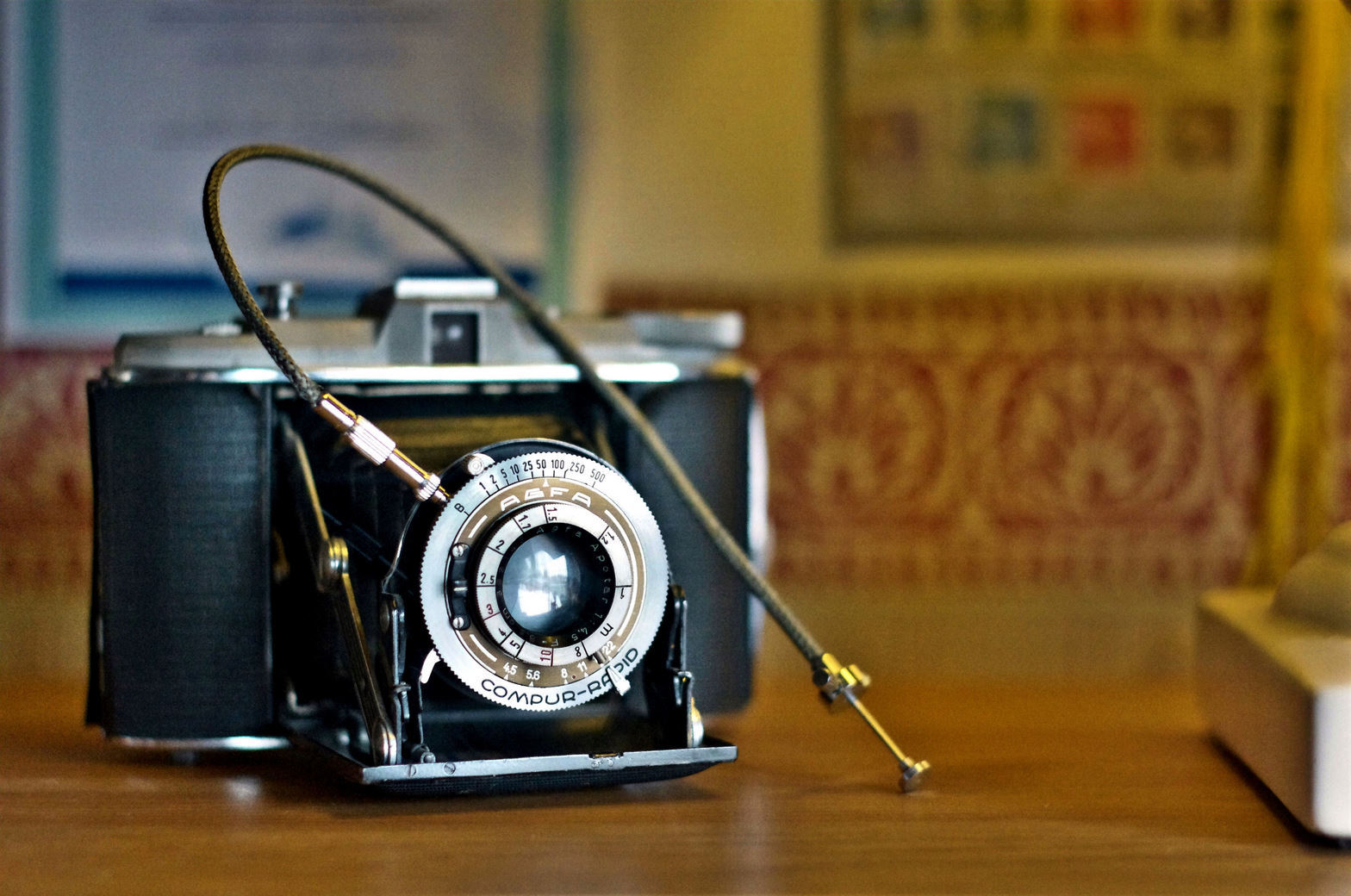 Agfa Rapid